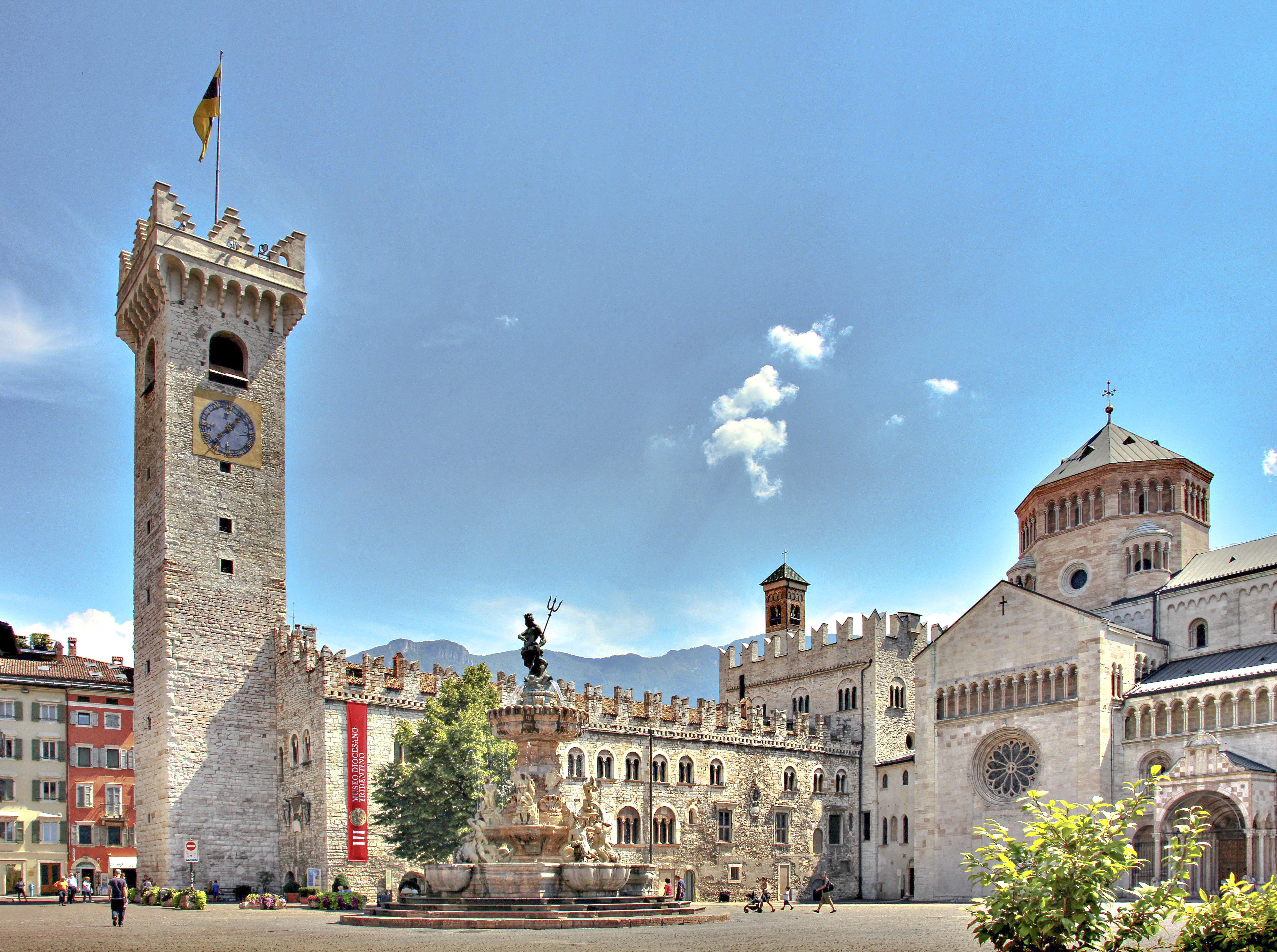 Palazzo Pretorio (Trento) This is a photo of a monument which is part of cultural heritage of Italy.